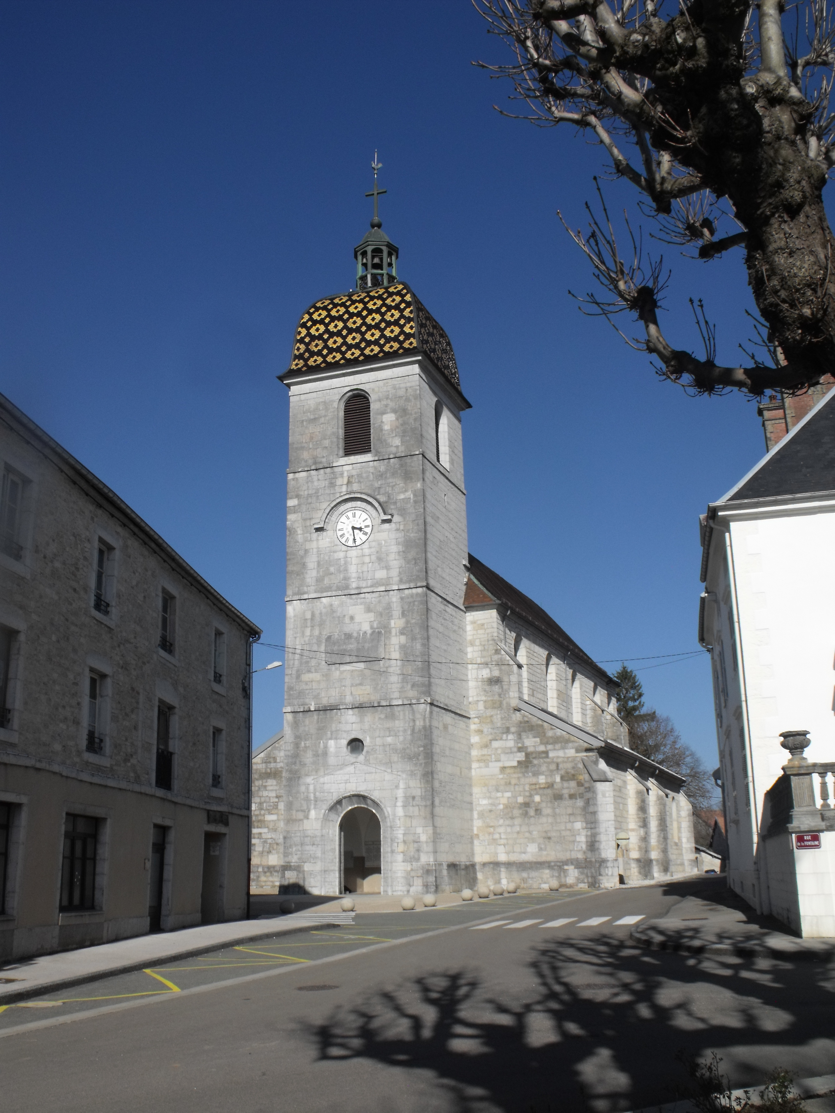 Église Sainte-Agathe de Vercel, Vercel-Villedieu-le-Camp, Doubs, France